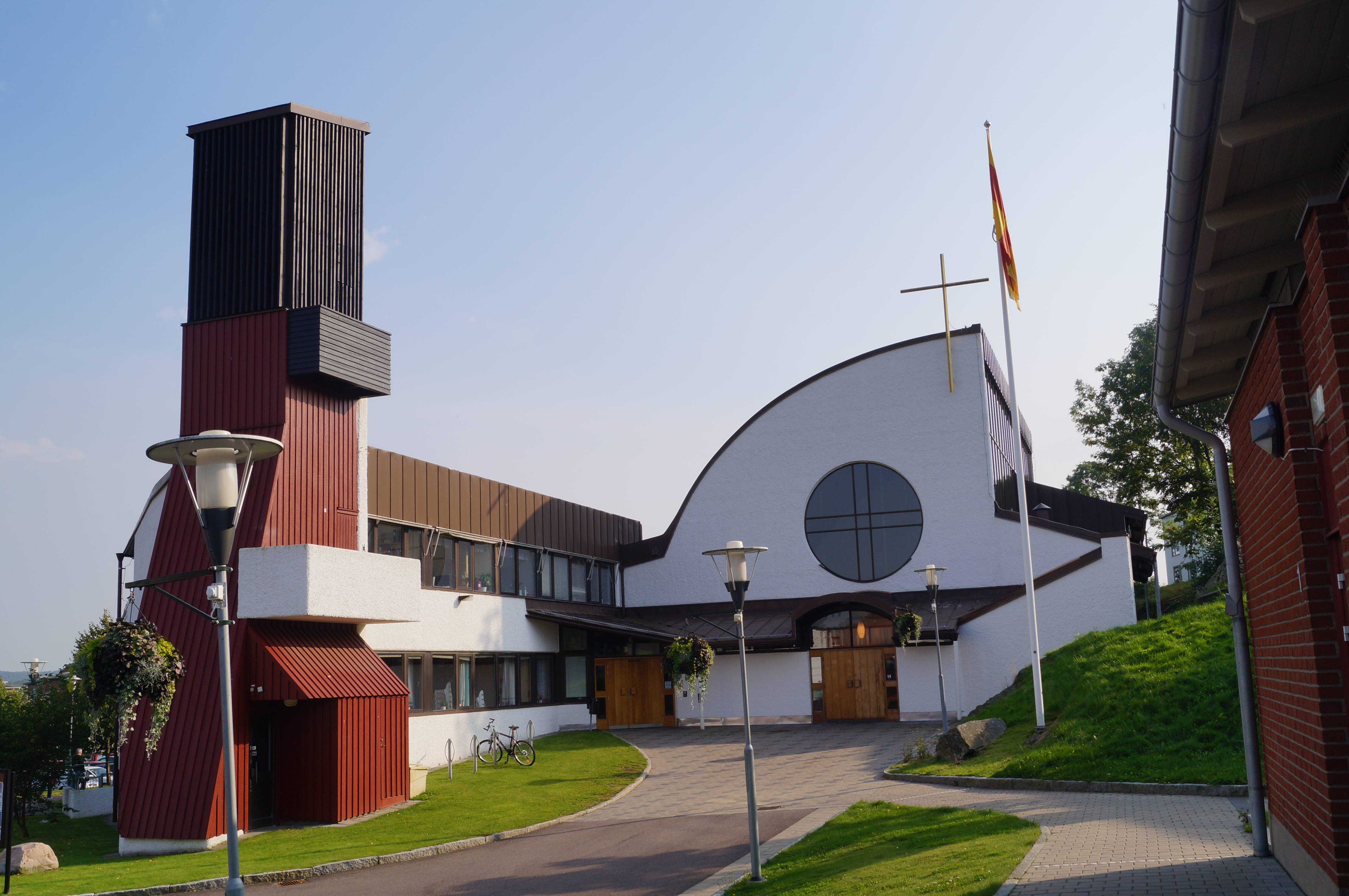 (Glöstorpskyrkan Tuve Tuve (10:156)